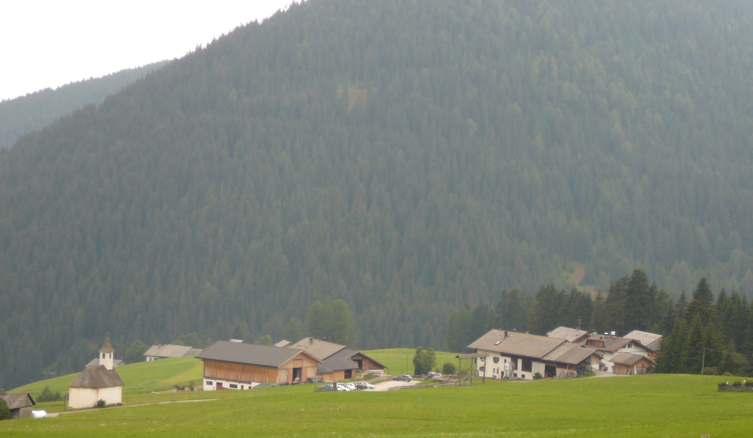 Gandelle sopra a Dobbiaco